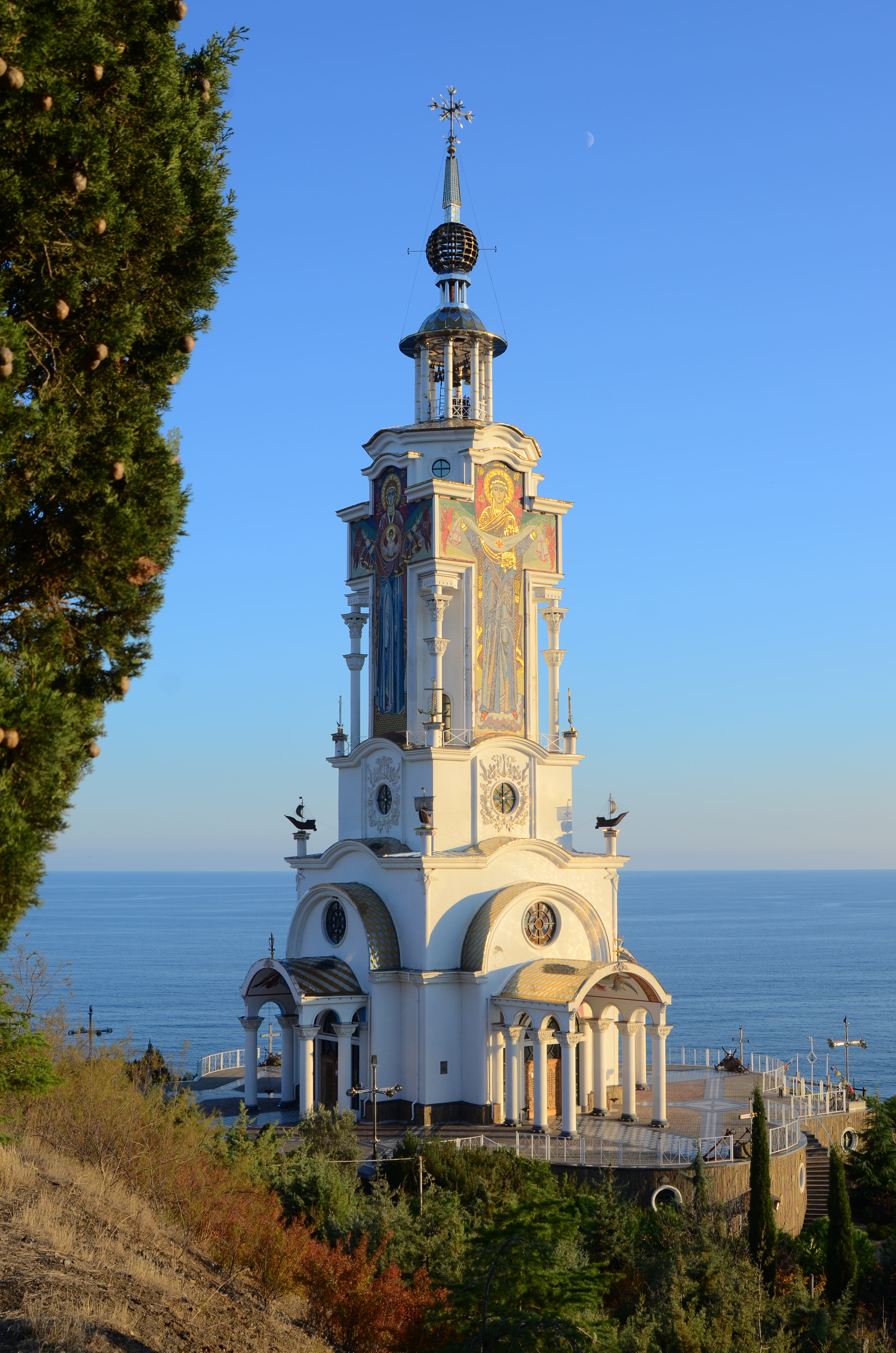 Крым.